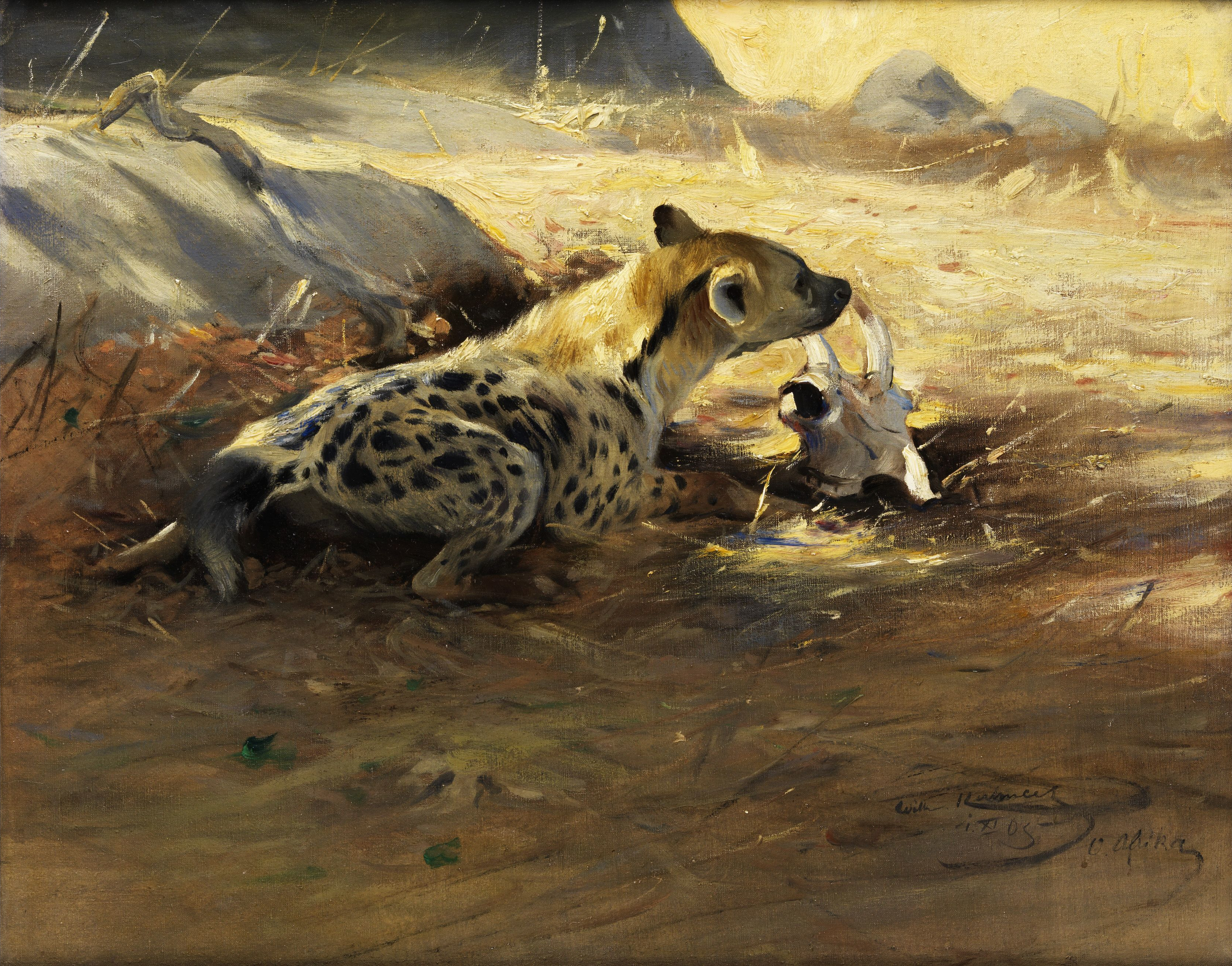 Hyäne. Öl auf Leinwand. 40 x 50 cm.